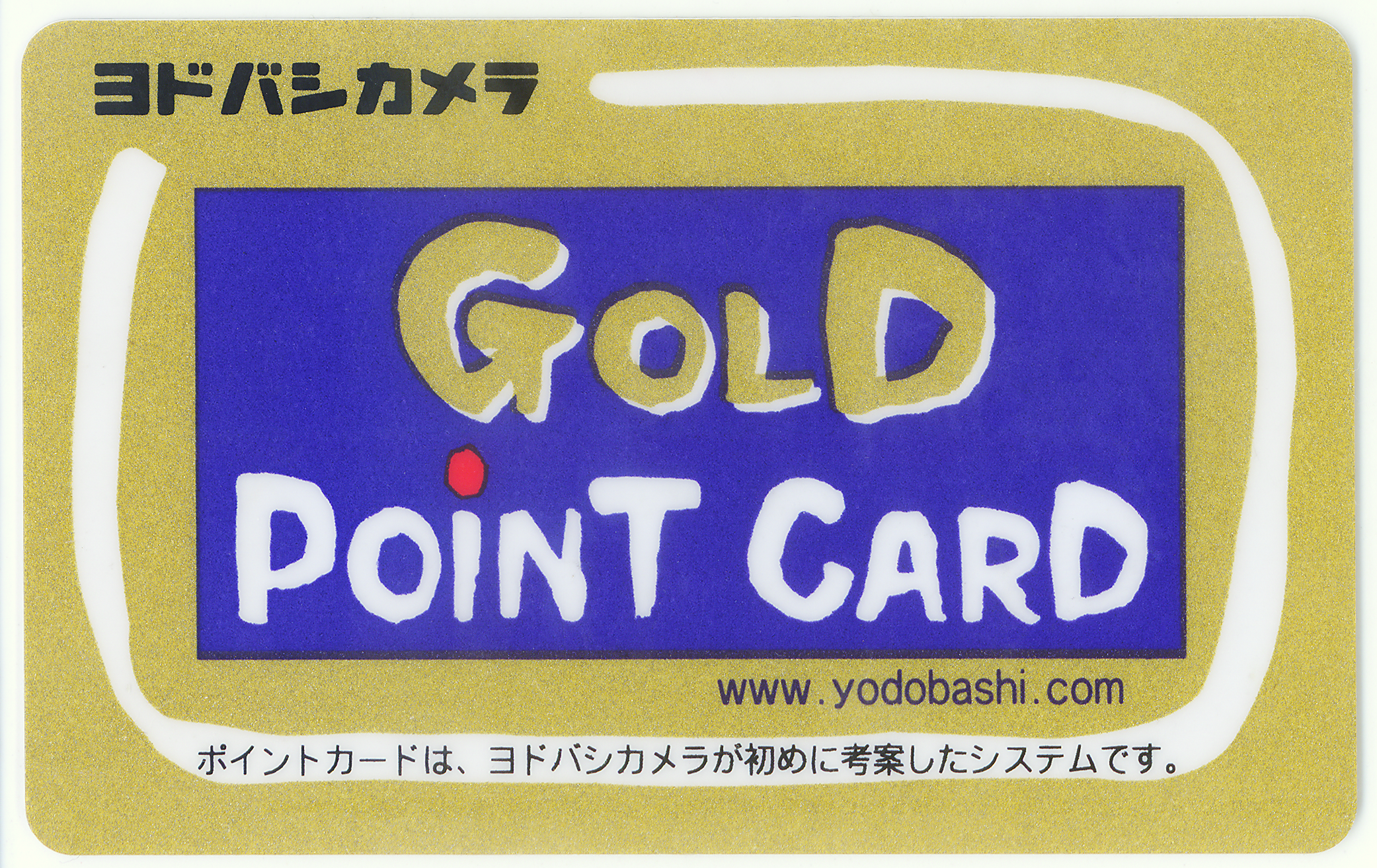 ヨドバシカメラのポイントカード。